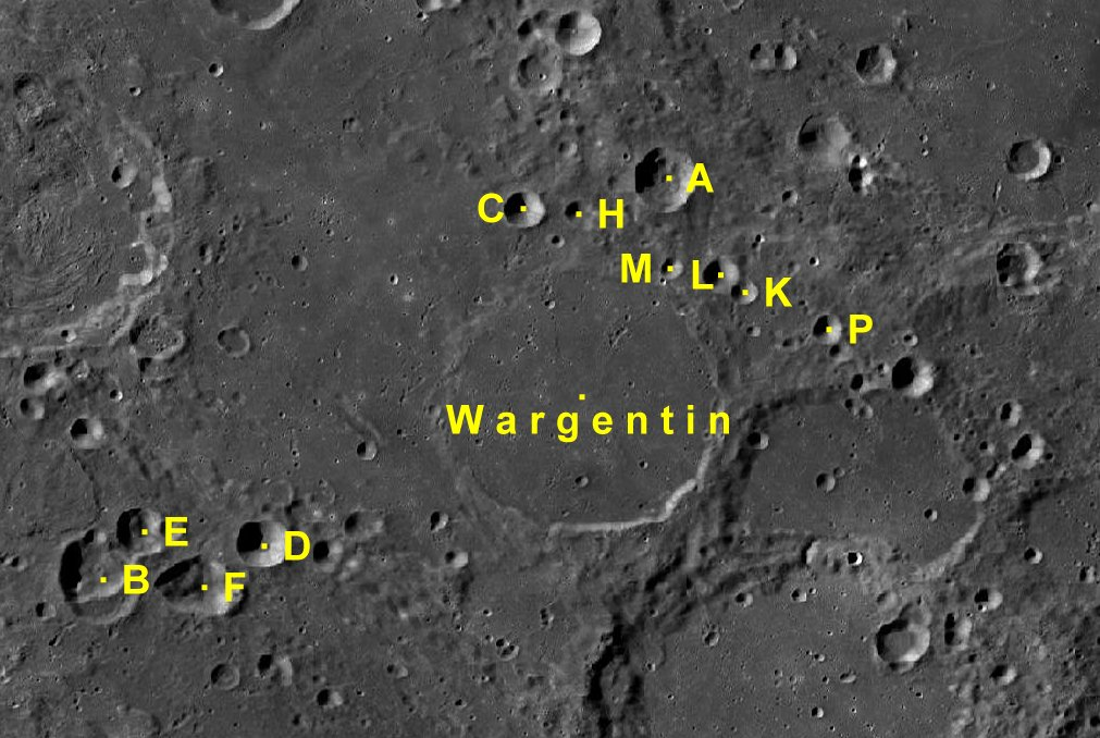 Cráter lunar Wargentin. Cráteres satélite. (Imagen LRO)